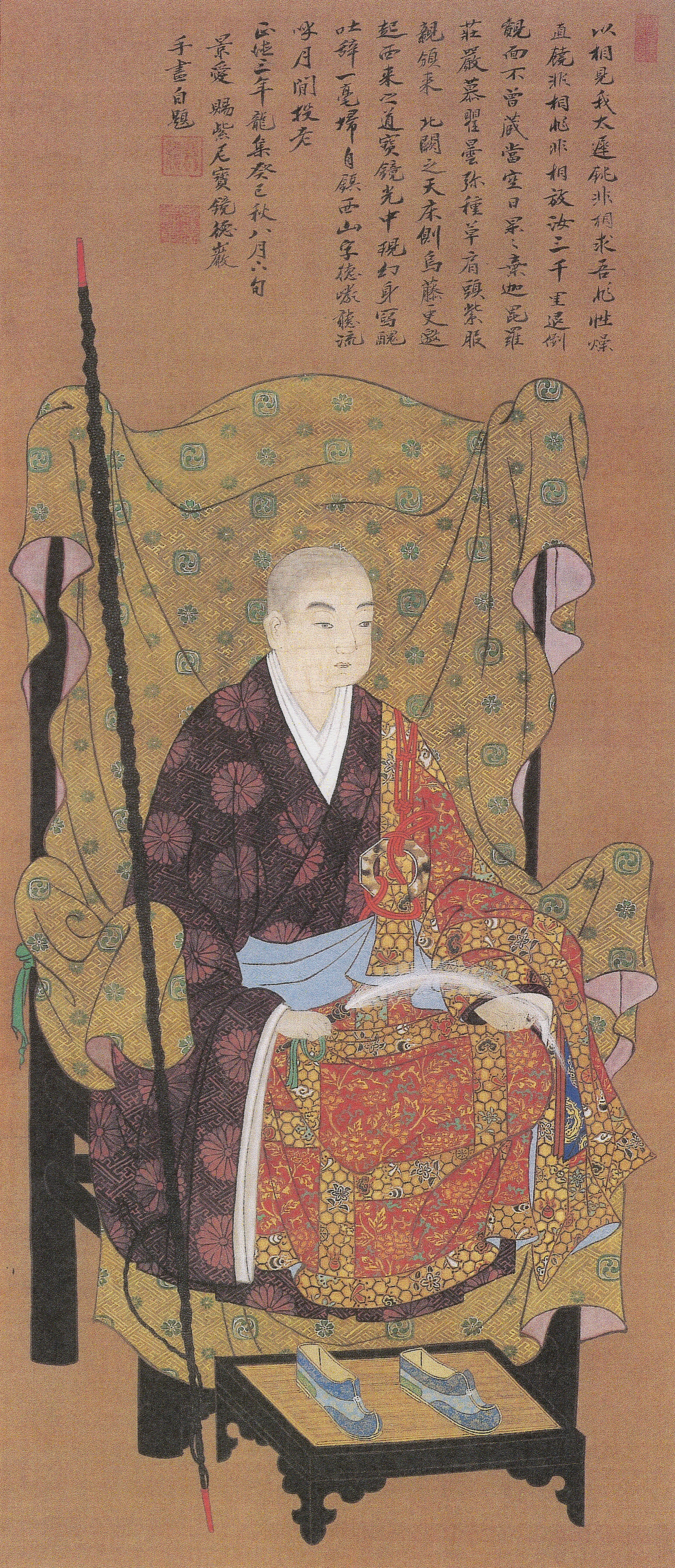 理豊女王(後西女王の第十一皇女、宝鏡寺門跡)の自画像。